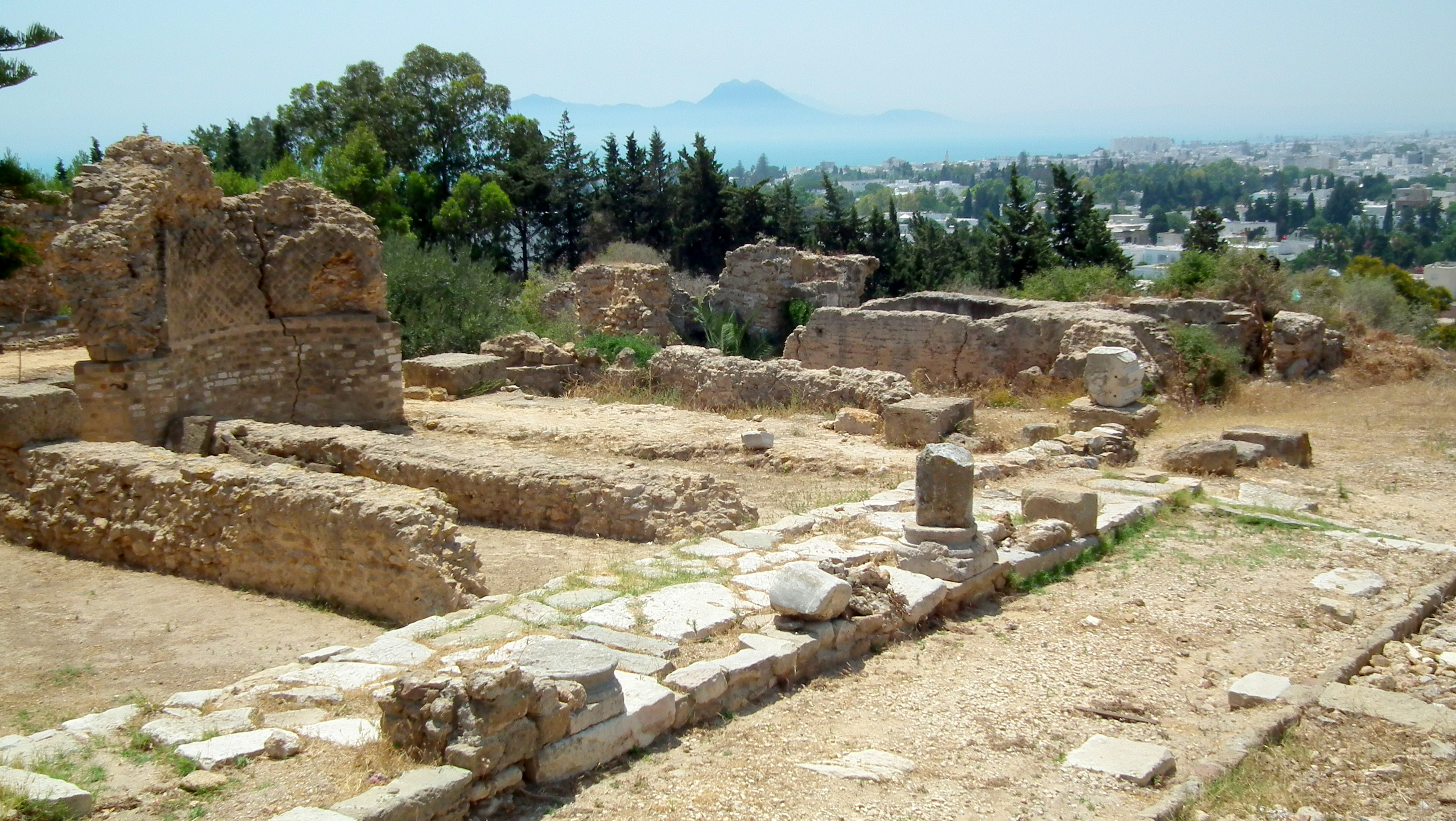 руины Карфагена